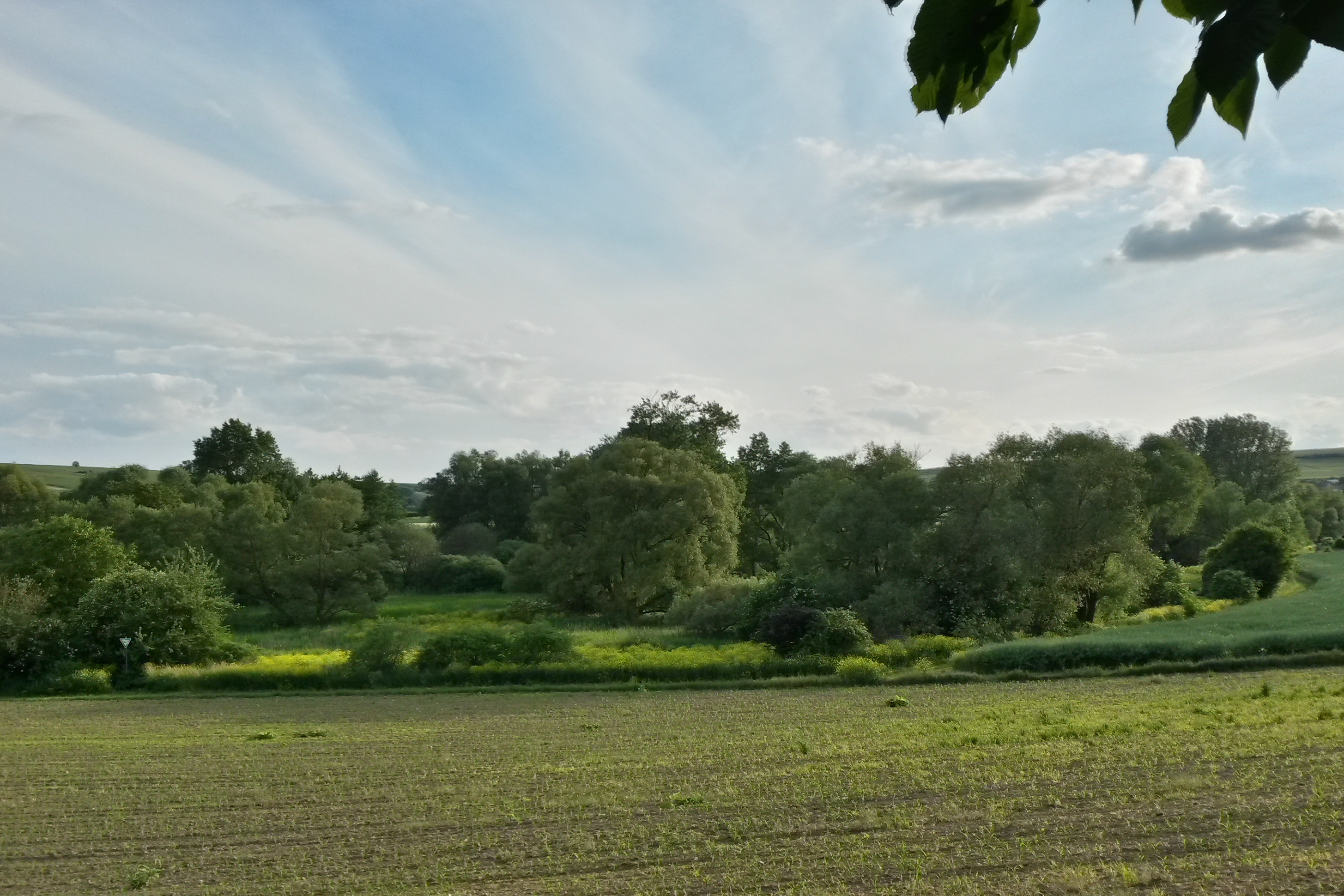 Naturschutzgebiet Bingerwiese im Landkreis Mainz-Bingen (Bubenheim, Schwabenheim, Engelstadt): Blick auf den nördlichen Gebietsteil mit hochwüchsigen Röhrichtbeständen und Baum-/Gehölzbeständen.